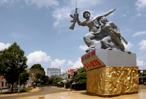 Chien thang phuoc long